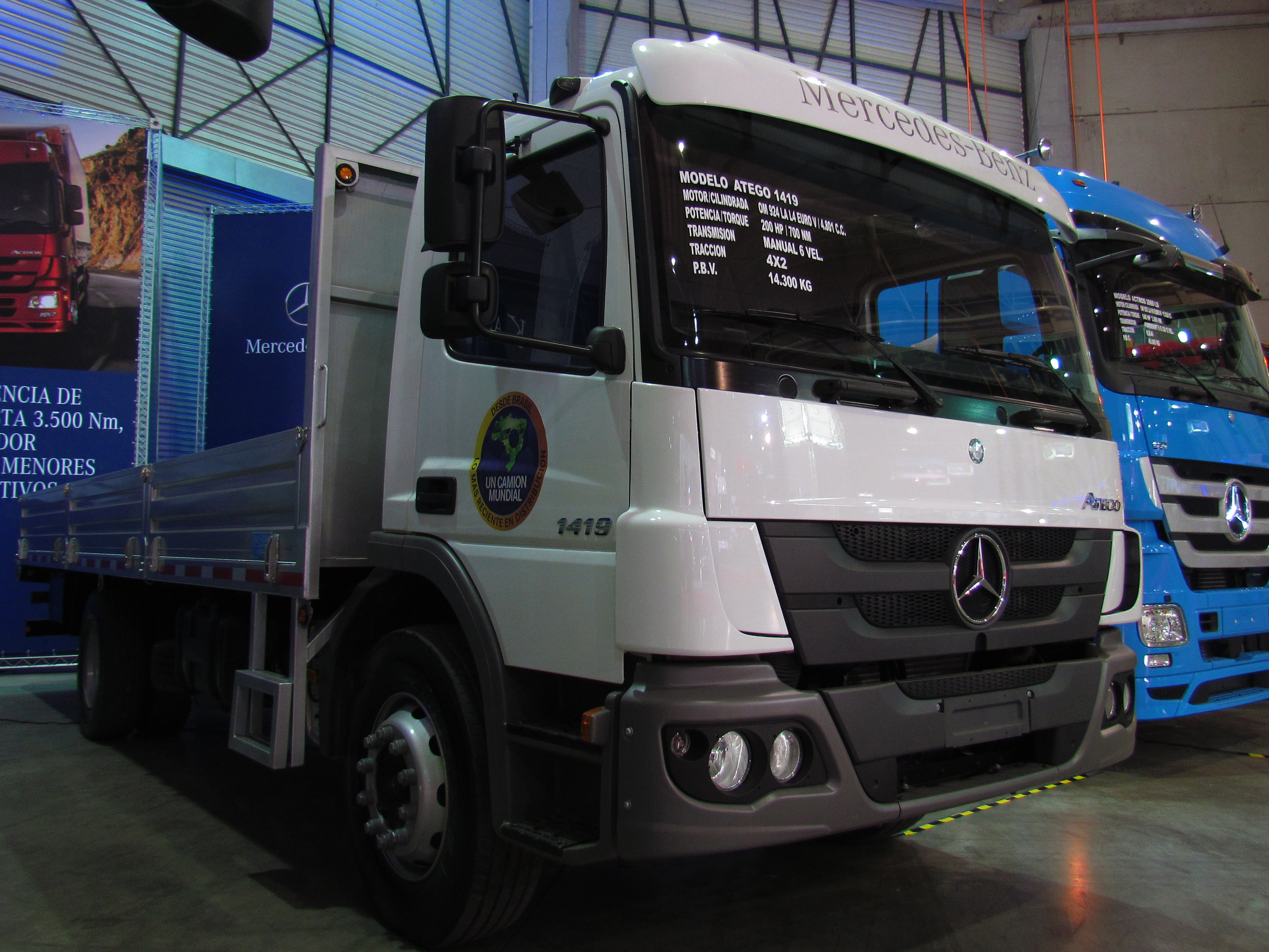 Mercedes Benz Atego 1419 2014